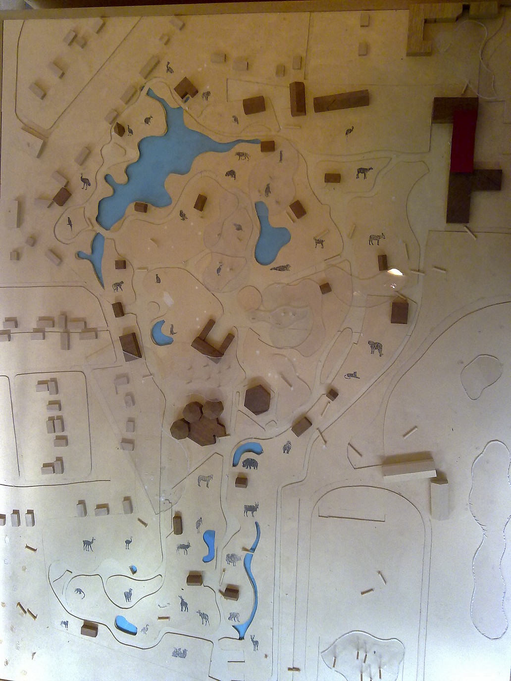 Foto des Masterplans 2017 (Tierpark Hamm)